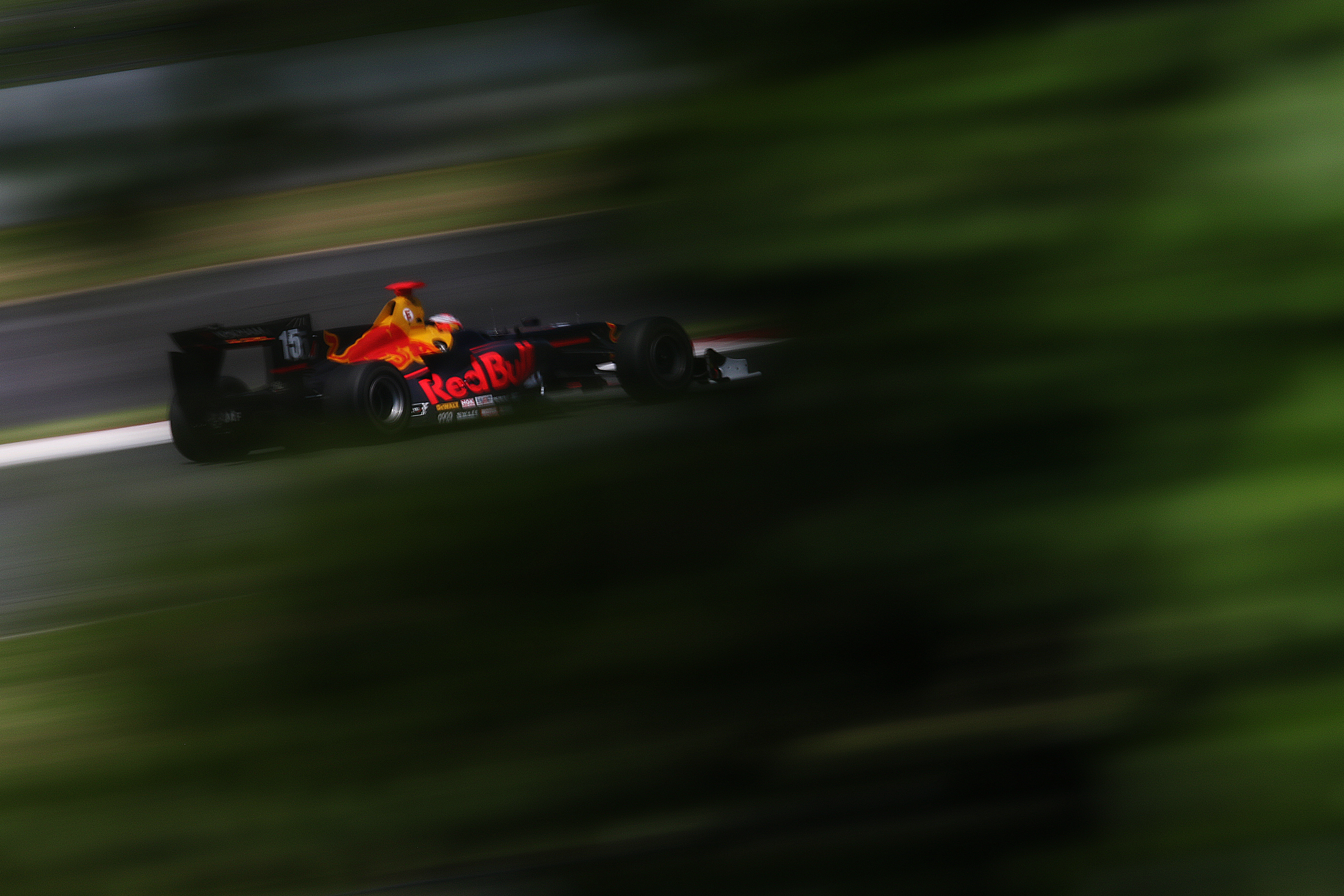 2017.07.08 SUPER FORMULA Rd.3 Fuji Speedway TEAM MUGEN 15 ピエール・ガスリー [7D2_7537ks]